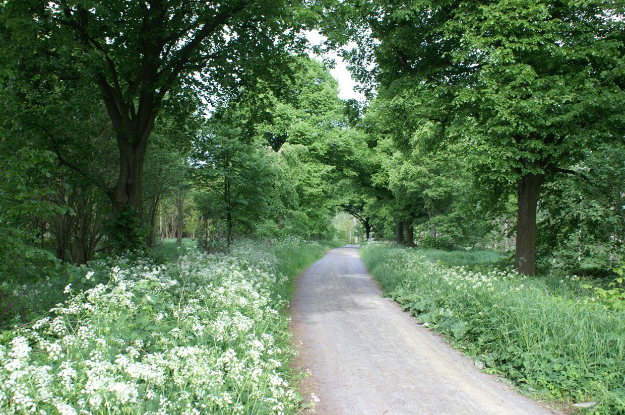 Die ehemalige Bernauer Heerstraße in der Nähe von Hobrechtsfelde. Heute ein Wander- und Radwanderweg durch den Naturpark Barnim.